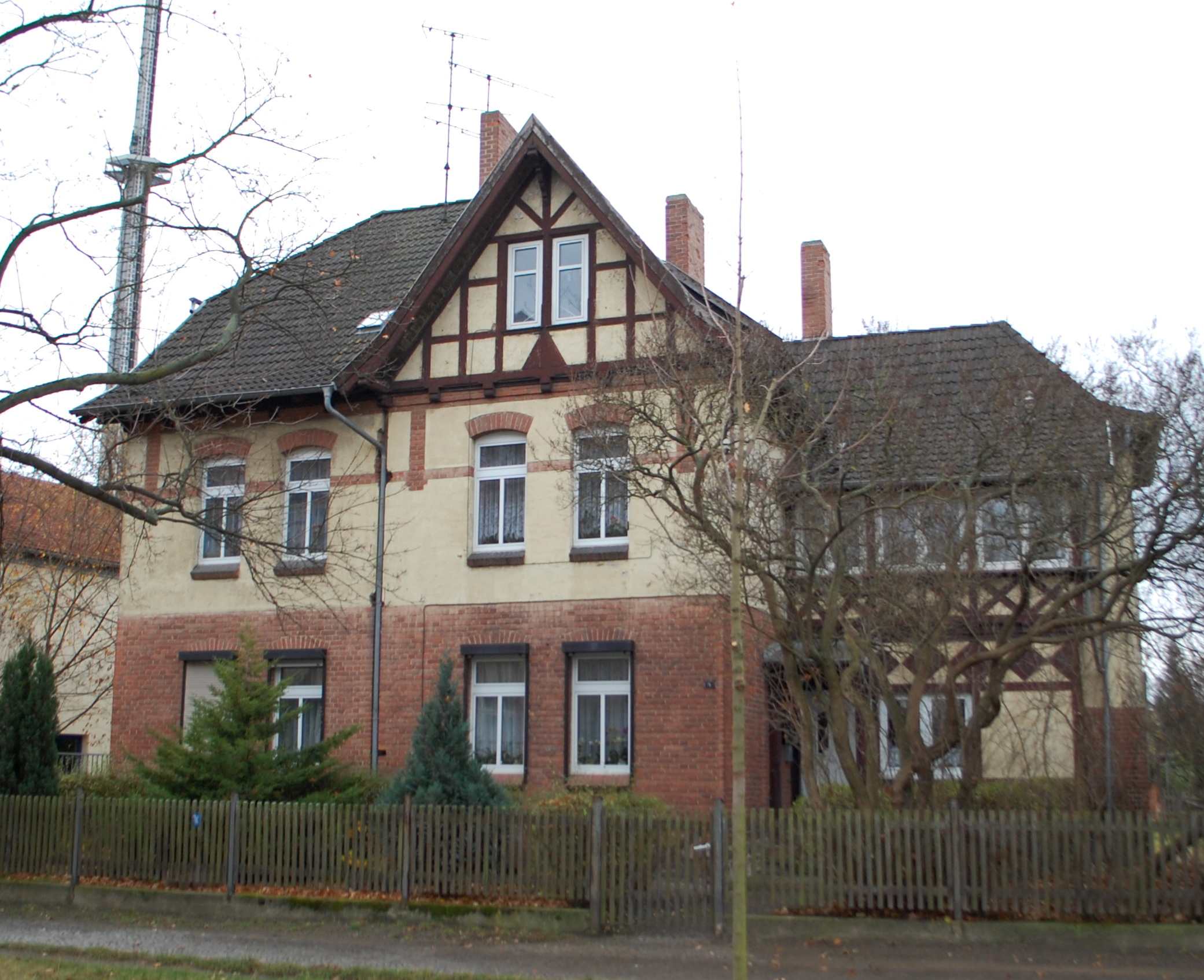 Haus Frachstraße 8 in Quedlinburg